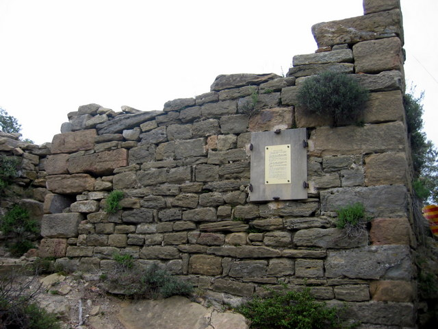 Castell de Colltort a la comarca de la Garrotxa - Catalunya